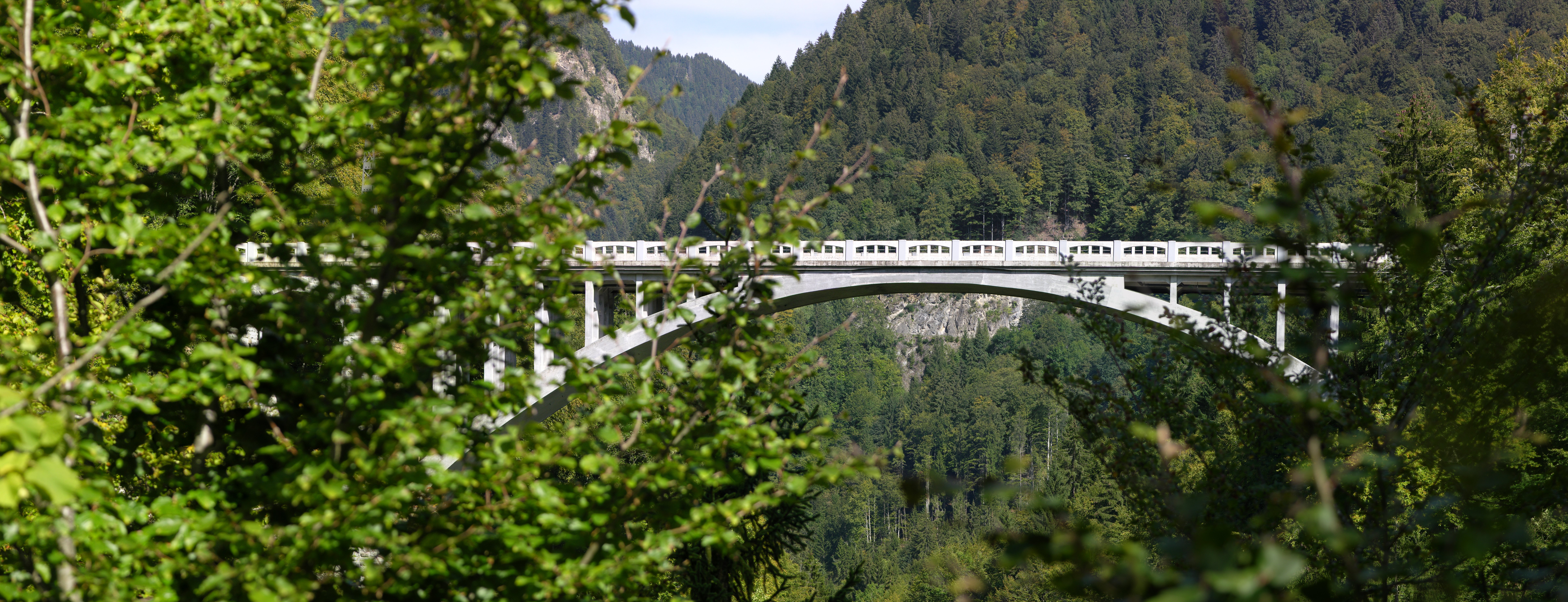 Pont des Planches, vu du côté ouest.